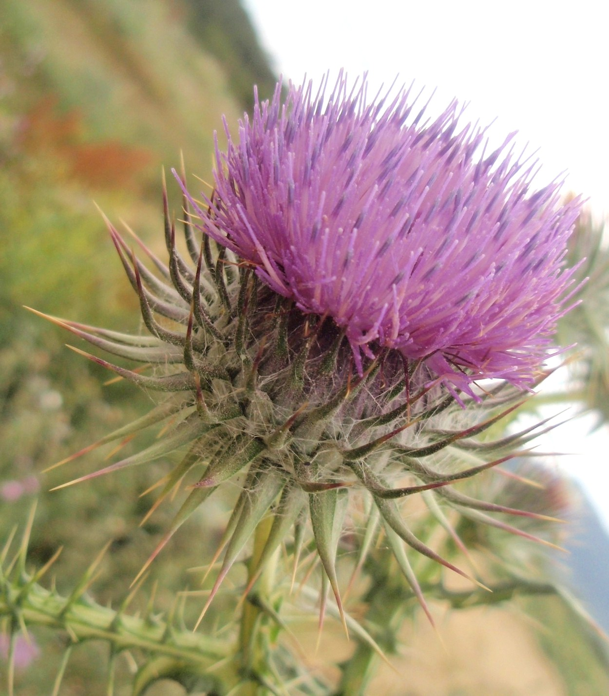 Onopordum corymbosum (Cardo borriquero) - Capítulo en antesis. - Campo de tiro de pichón y circuito de motos en Banyeres, Provincia de Alicante (España).